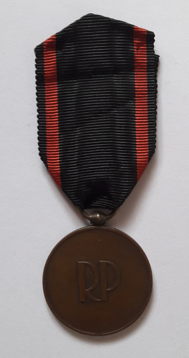 Rewers MN